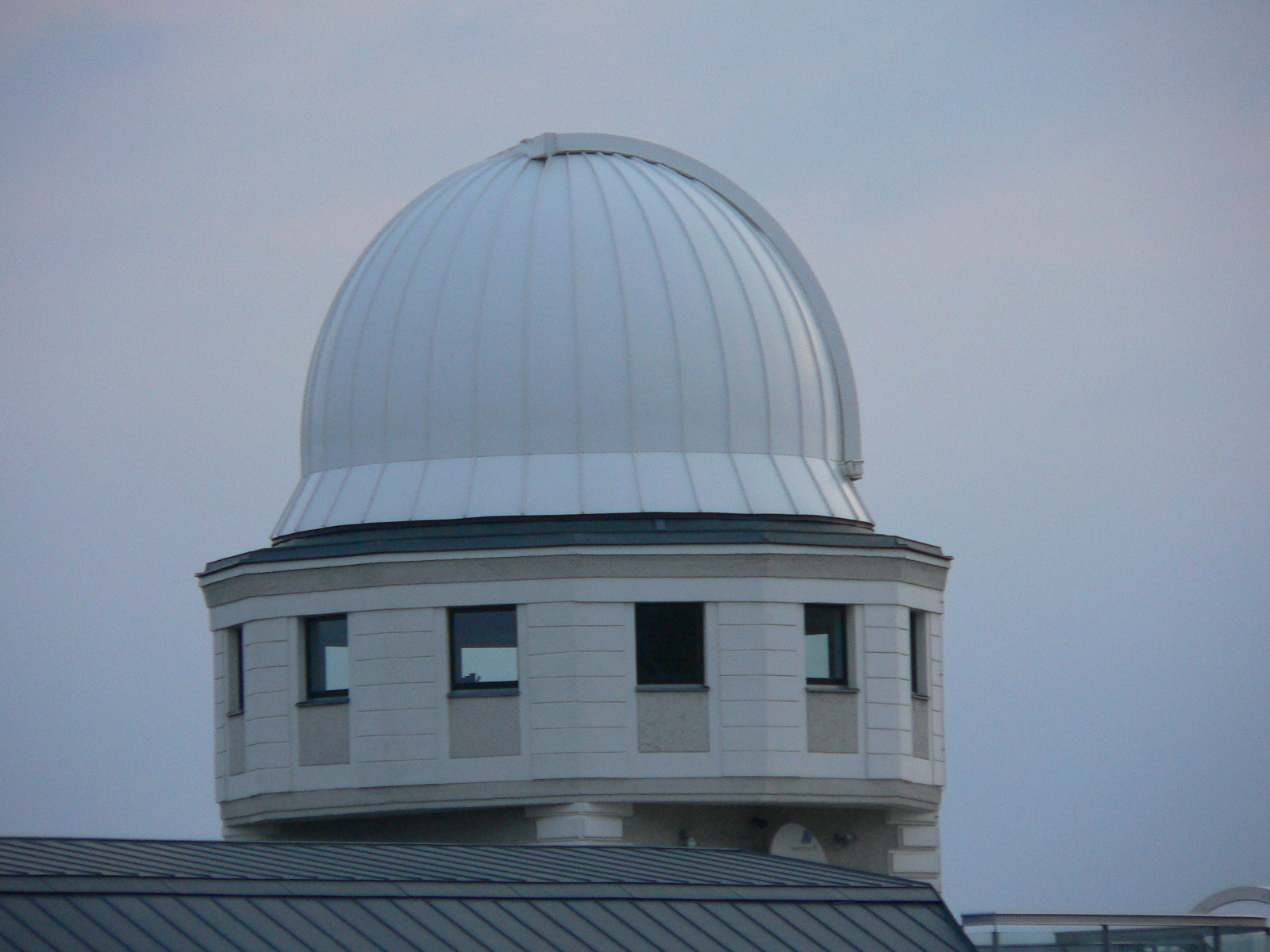 Wien, Urania Sternwarte